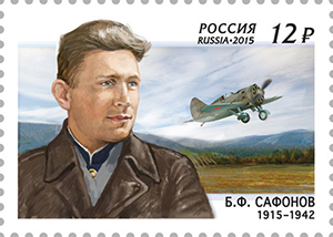 100 лет со дня рождения Б.Ф. Сафонова (1915–1942), лётчика-истребителя, дважды Героя Советского Союза